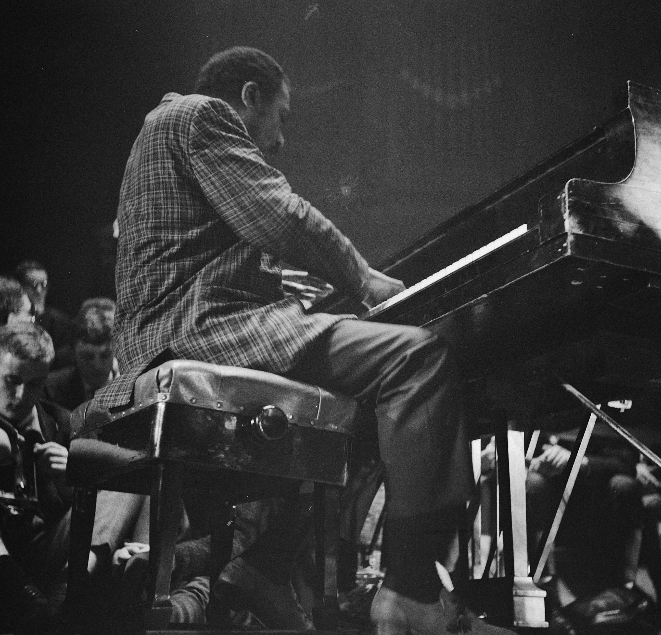 Collectie / Archief : Fotocollectie Anefo Reportage / Serie : [ onbekend ] Beschrijving : Nachtconcert van Thelonious Monk in het Concertgebouw Datum : 15 april 1961 Trefwoorden : CONCERTGEBOUWEN, Nachtconcerten Persoonsnaam : Monk, Thelonious Fotograaf : Fotograaf Onbekend / Anefo Auteursrechthebbende : Nationaal Archief Materiaalsoort : Negatief (zwart/wit) Nummer archiefinventaris : bekijk toegang 2.24.01.03 Bestanddeelnummer : 912-3527